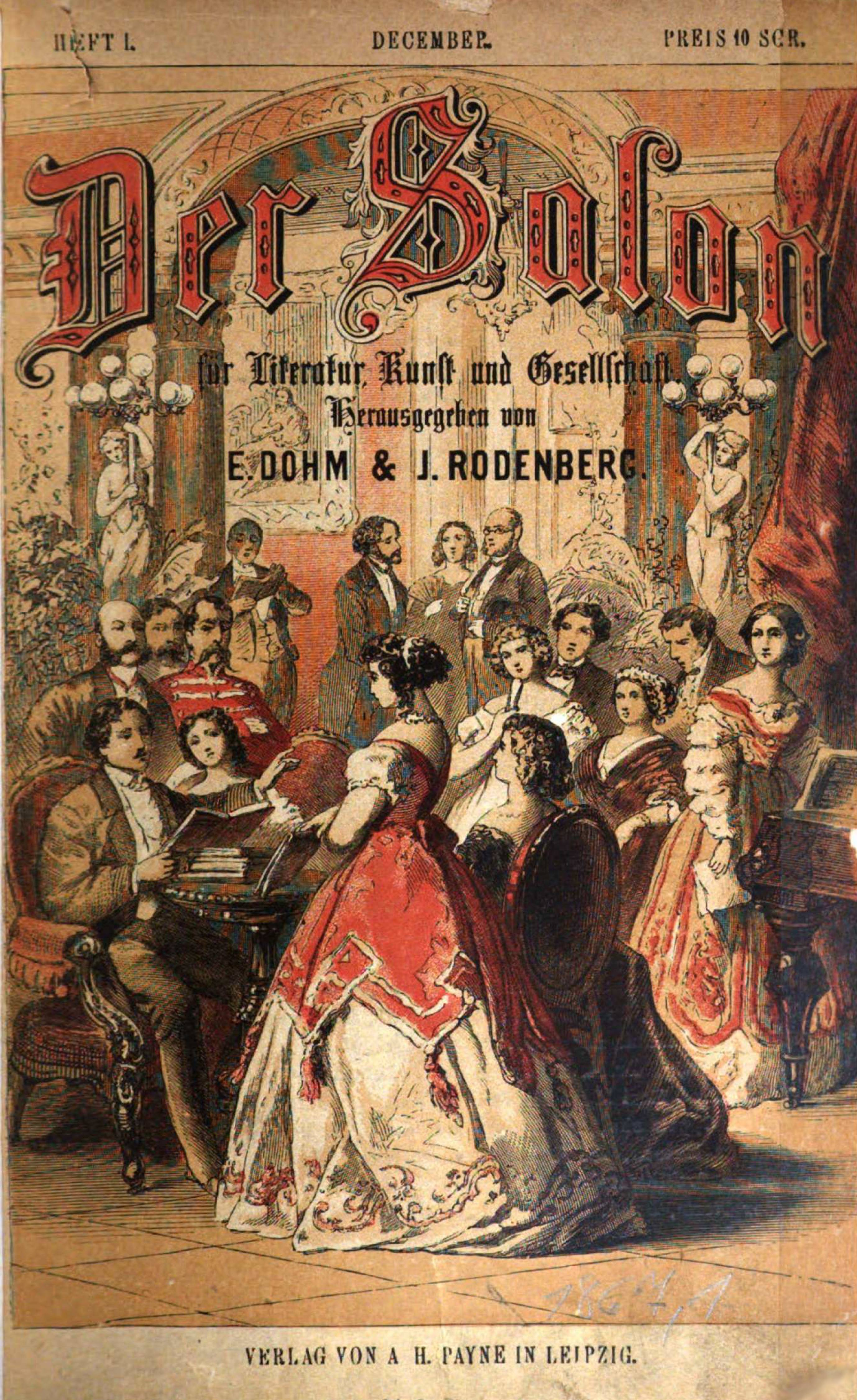 Titelblatt: Der Salon für Literatur, Kunst und Gesellschaft. Heft 1 [1867]. Herausgegeben von Ernst Dohm und Julius Rodenberg. A. H. Payne, Leipzig 1867